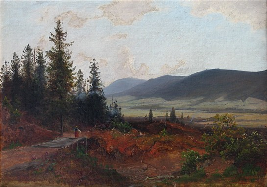 Blick ins Gäu, Ölbild auf Leinwand, um 1855